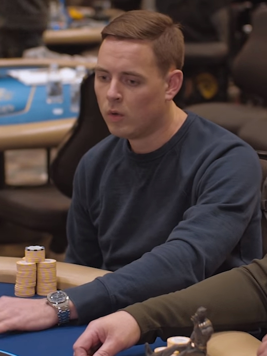 Toby Lewis bei der WPT Gardens